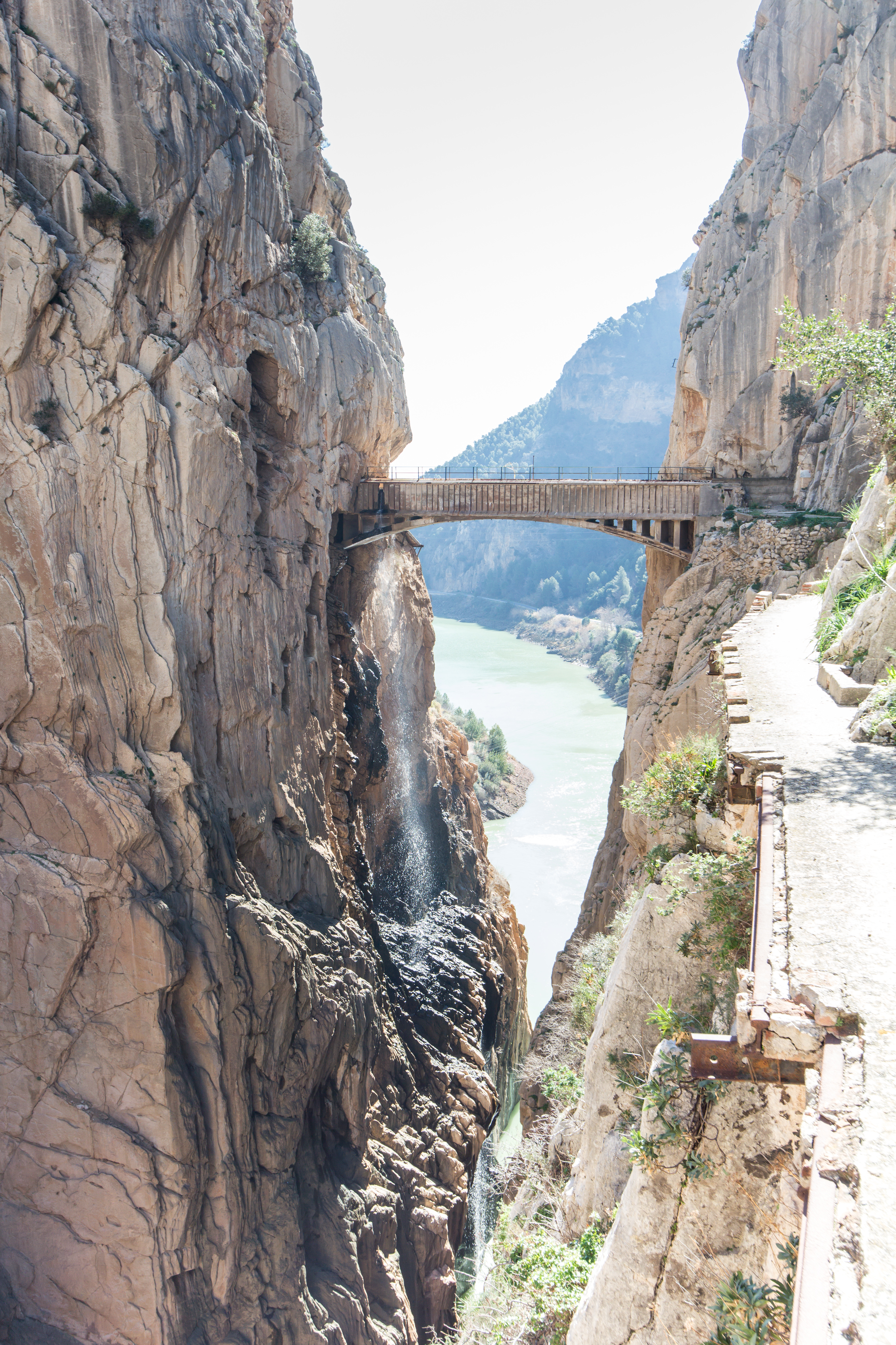 Brücke des Caminitio del rey